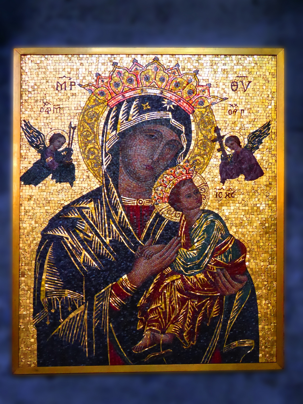 Ikone, Maria mit Kind in der röm.kath.St. Anton Kirche, Basel